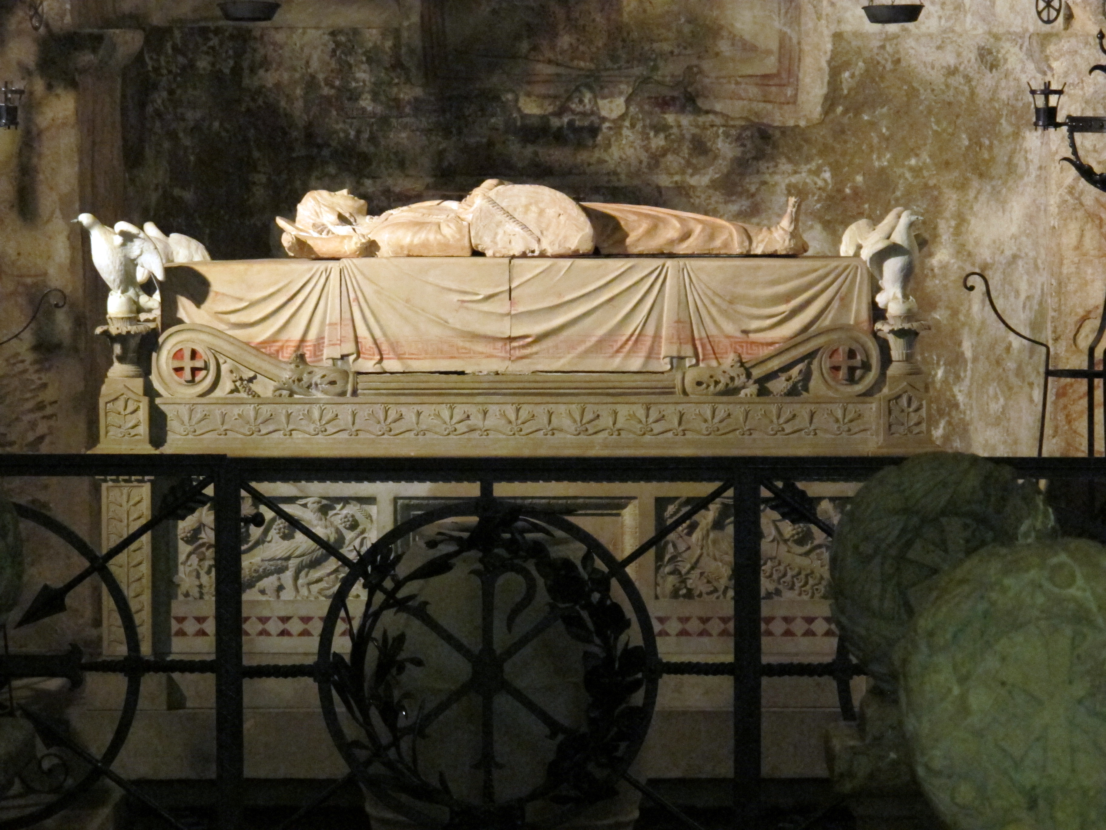 Santi Giorgio e Cristina (Bolsena) - Interno